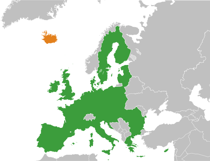 Izland és az Európai Unió elhelyezkedése